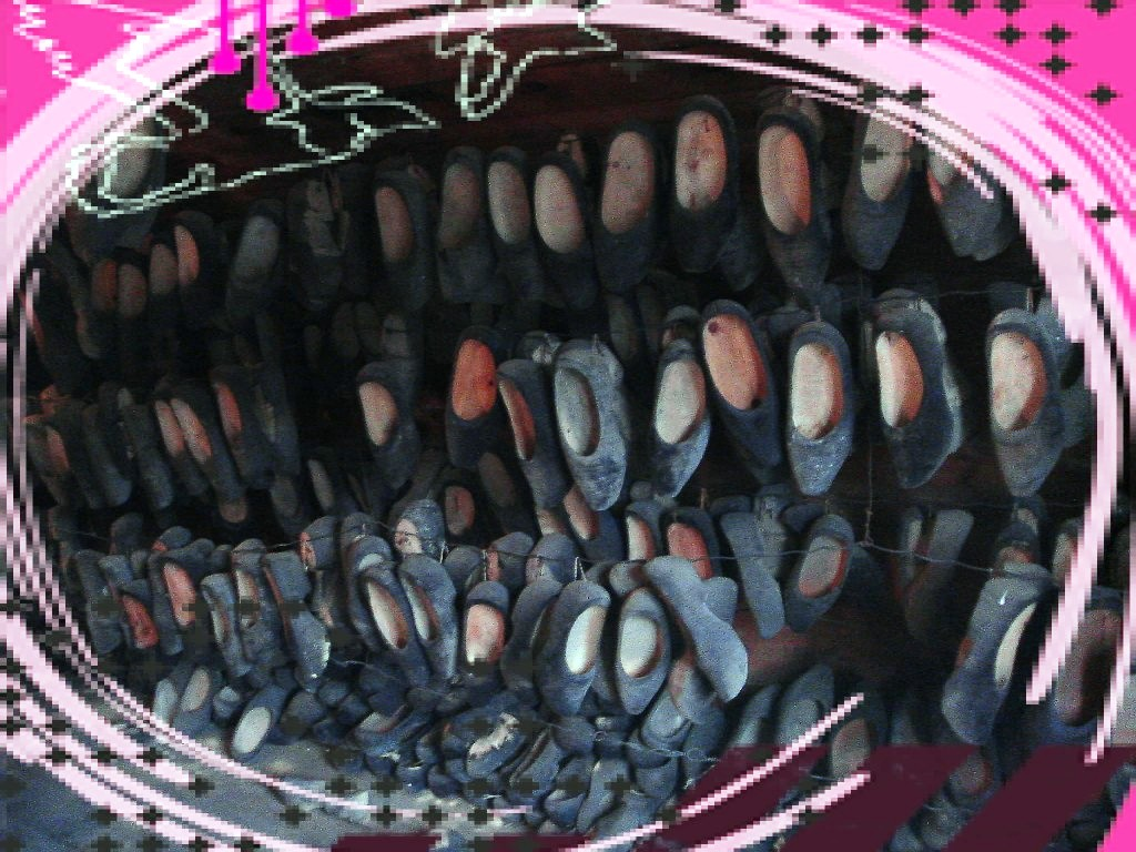 Osterøy tresko-museum